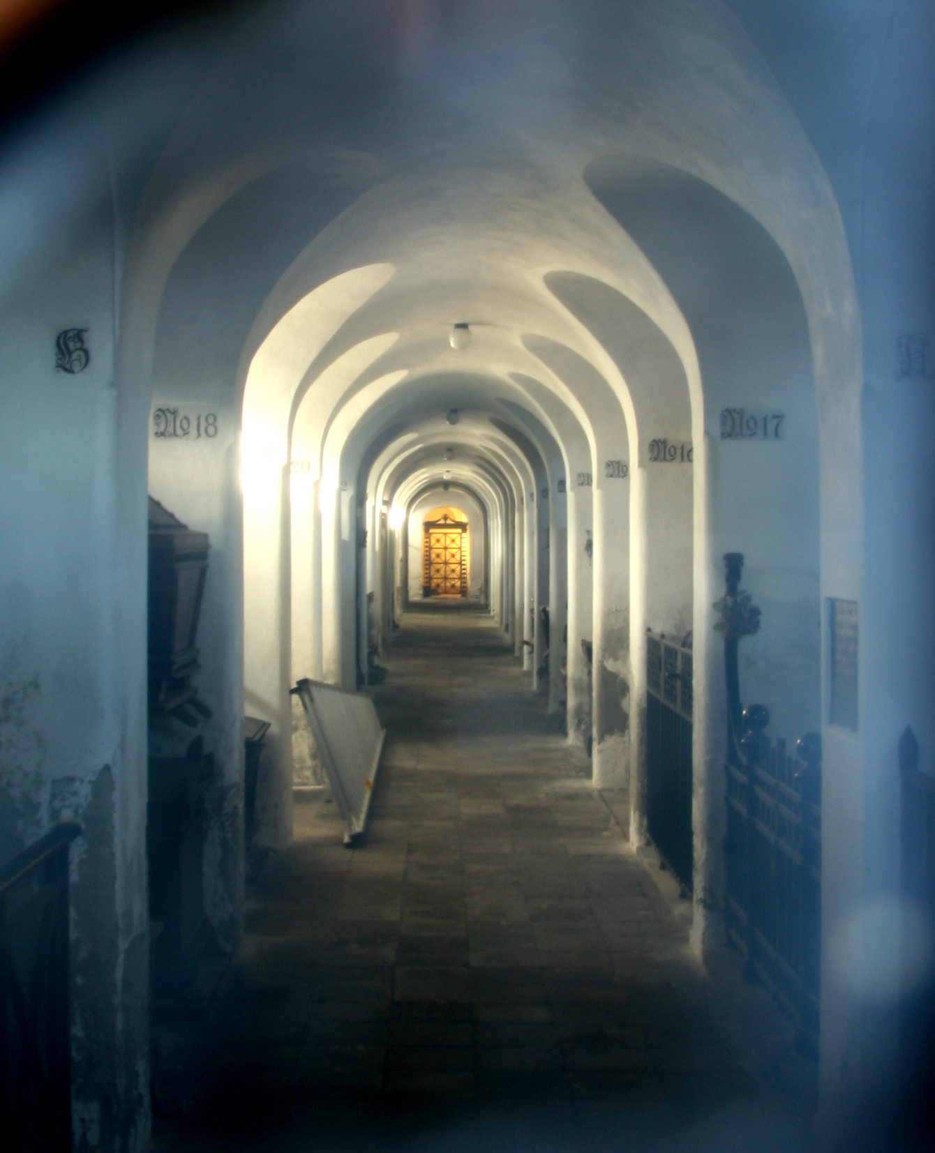 Holmens Kirke, Copenhagen, Denmark . Store kapel, krypt. Smugkig gennem ruden i døren.